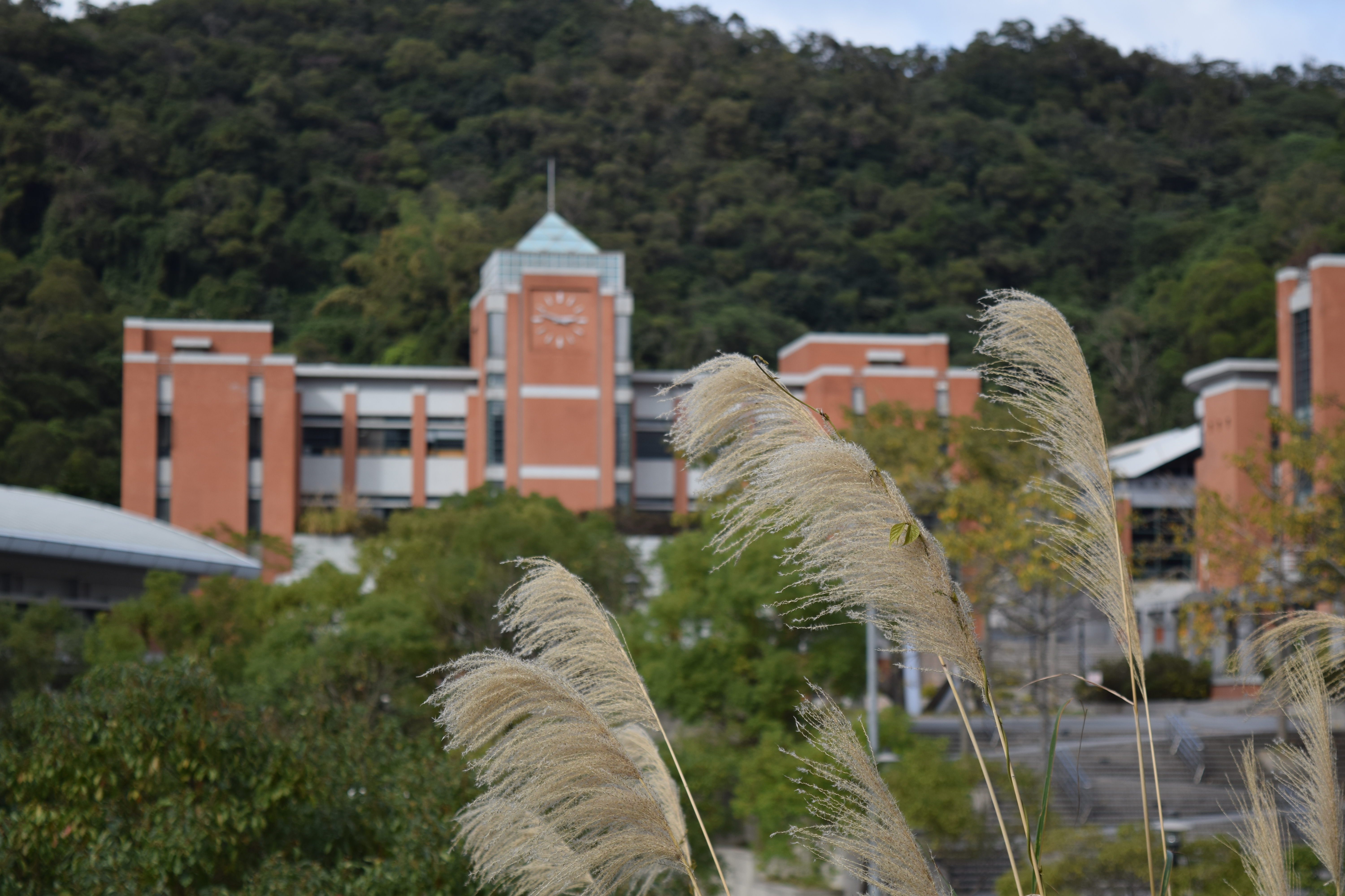 自小山丘眺望麗山高中鐘樓